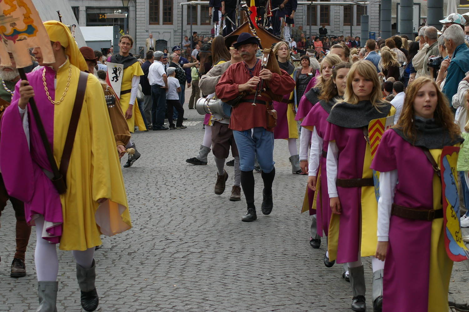 Le groupe des 19 communes, ducasse d'Ath, en 2008